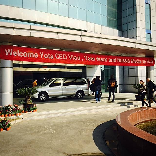 Рабочие фабрики в Суджоу радостно приветствуют участников российской делегации. (Здесь собирают Yotaphone 2)